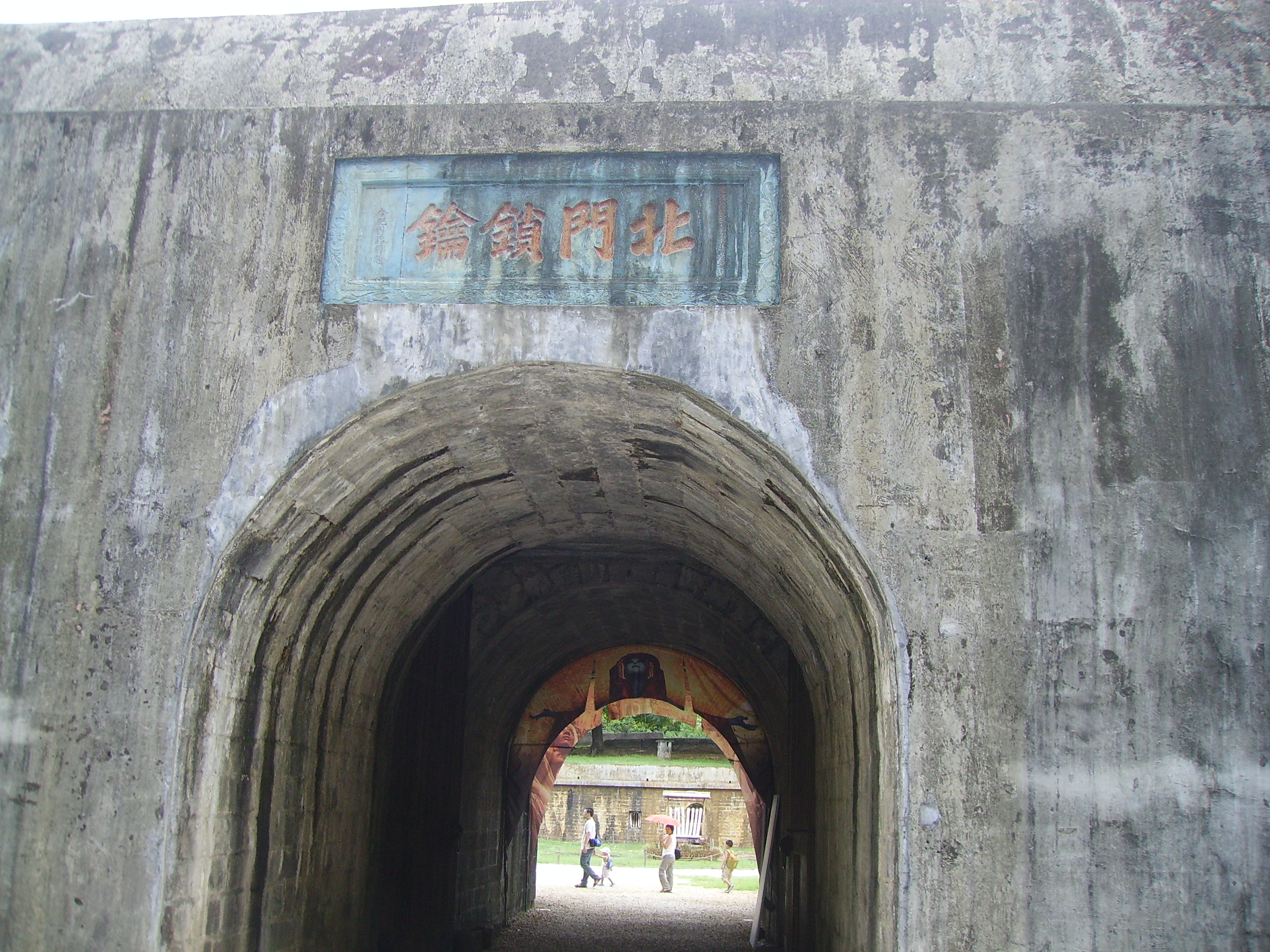 滬尾炮台的外牆；上面掛著劉銘傳所題「北門鎖鑰」碑文。